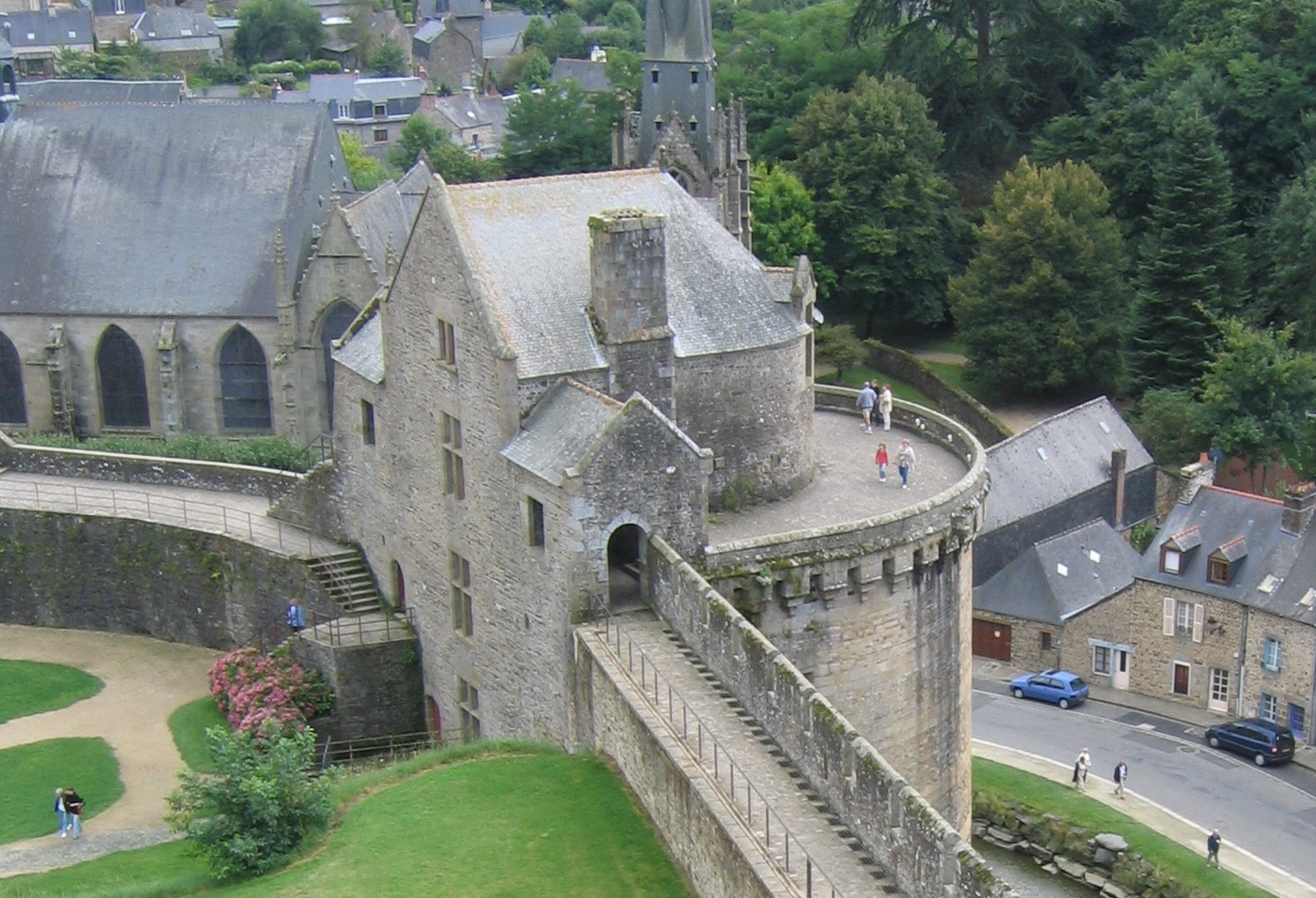 La tour Surienne du château de Fougères avec sa terrasse aménagée pour recevoir des canons